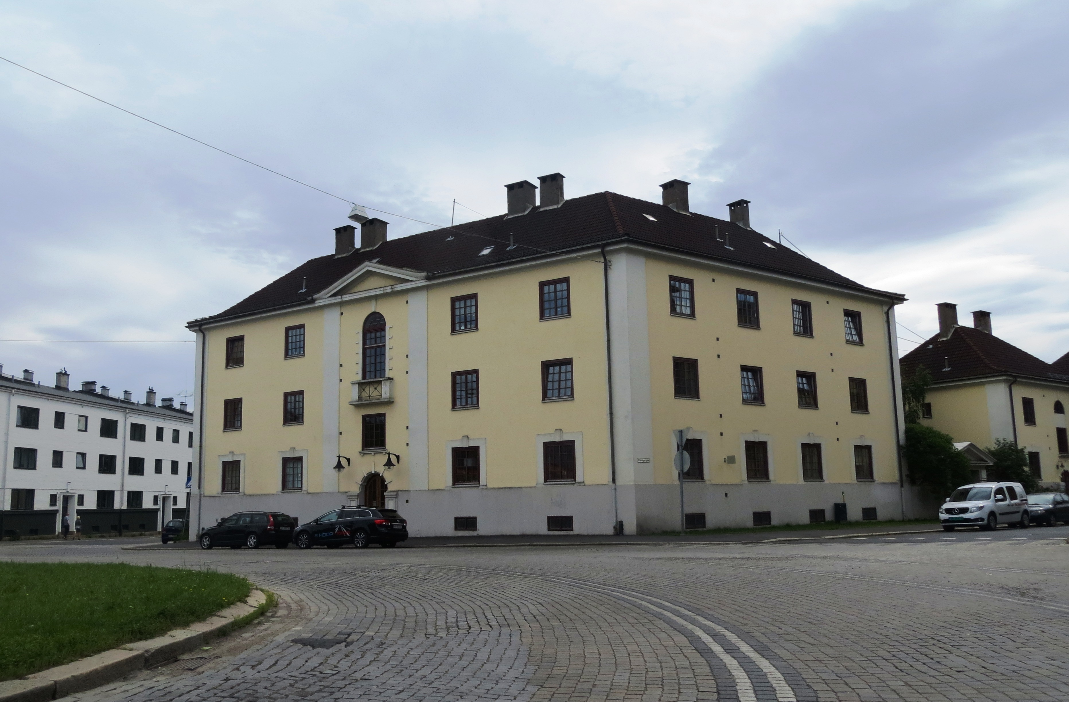 Bygårdene mellom Bergensgate og Stavangergate på Bjølsen er lokalt vernet av Riksantikvaren. Dette omfatter 4 bygninger. Bildet viser Bergensgata 24c med front mot Lisa Kristoffersens plass.